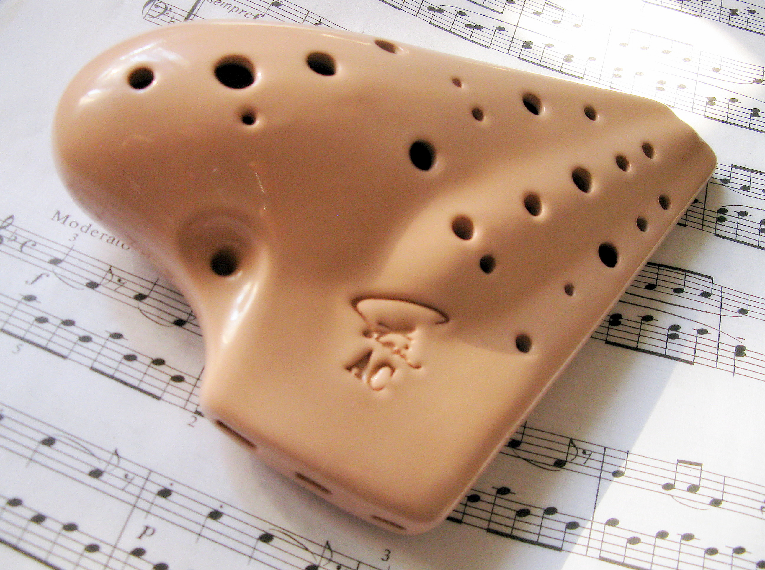 Focalink "dolce" típusú tripla okarínája